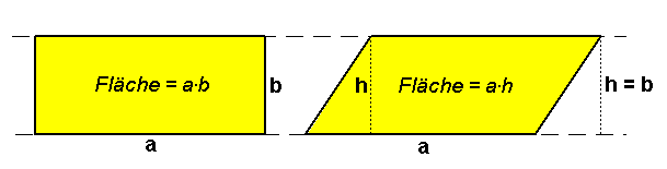 Scherung eines Rechtecks zu einem Parallelogramm